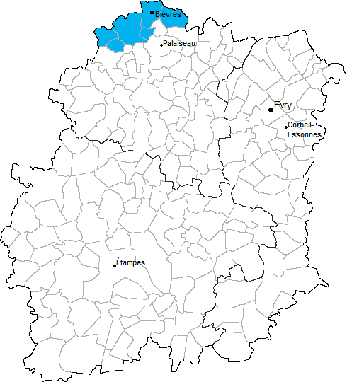 Carte de localisation du canton de Bièvres en Essonne (91)